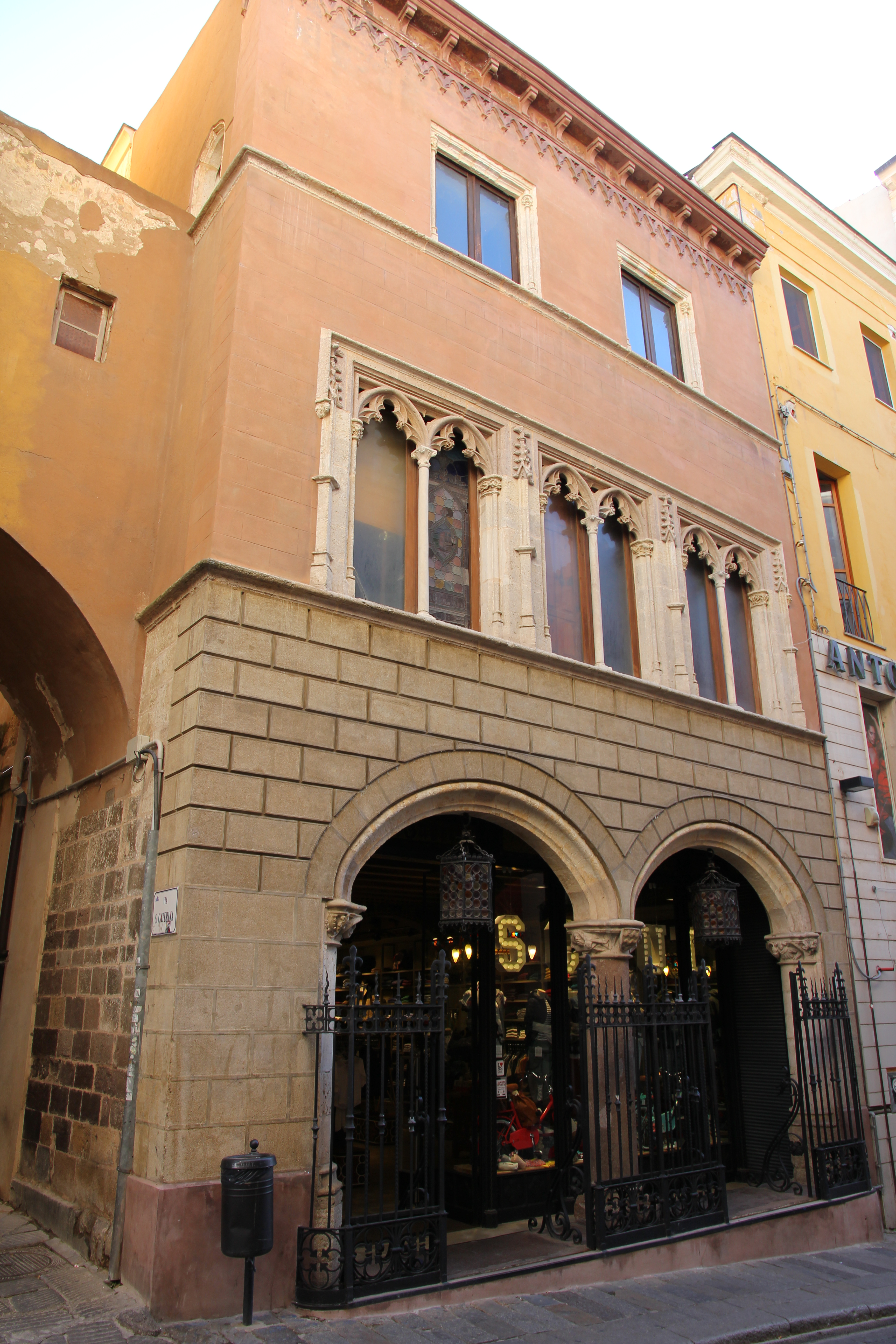 Sassari - Casa di Re Enzo